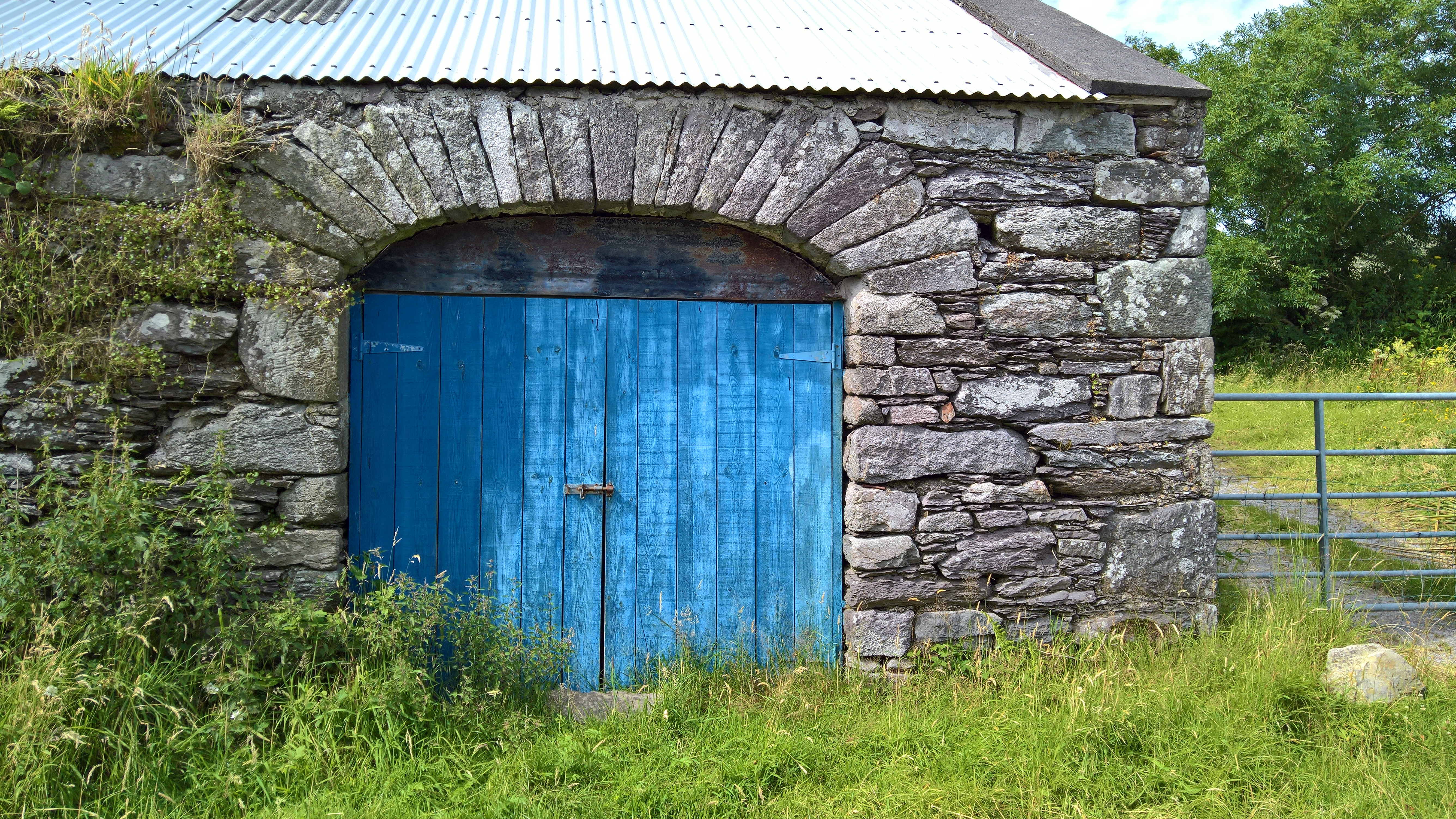 Reste des Fermoyl Castle im Townland Formaoil (TC Trian Iarthach) im nahegelegenen alten langgestreckten Farmhaus (große Sandsteinblöcke)